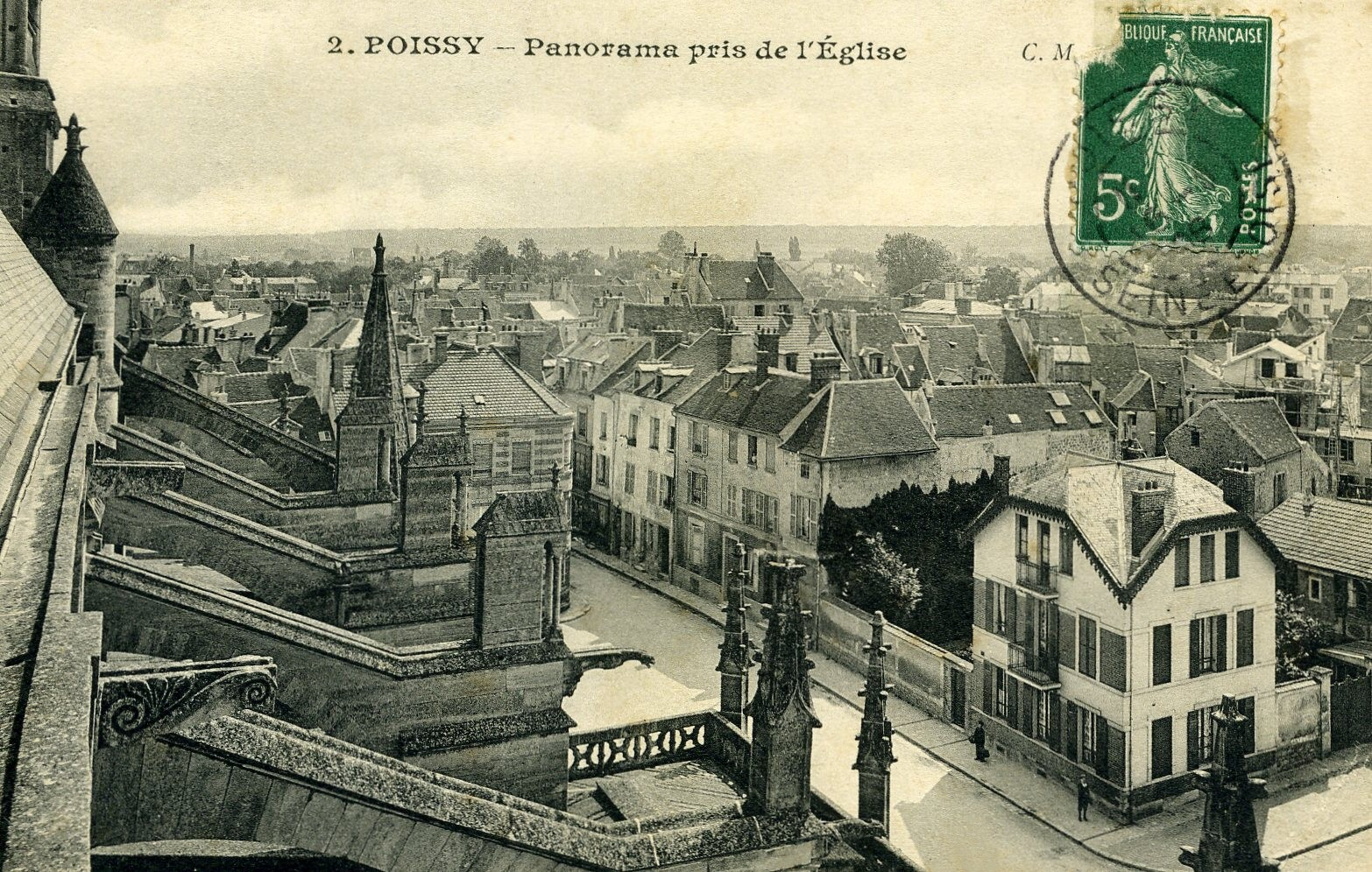 Panorama de Poissy (Yvelines - France) vue depuis la collégiale Notre-Dame de Poissy en direction du nord ouest, au sol la rue de l'eglise, l'essentiel du bâti visible sur la carte postal fut détruit dans les années 60-70 pour laissé place au barres de la rue du Cep.